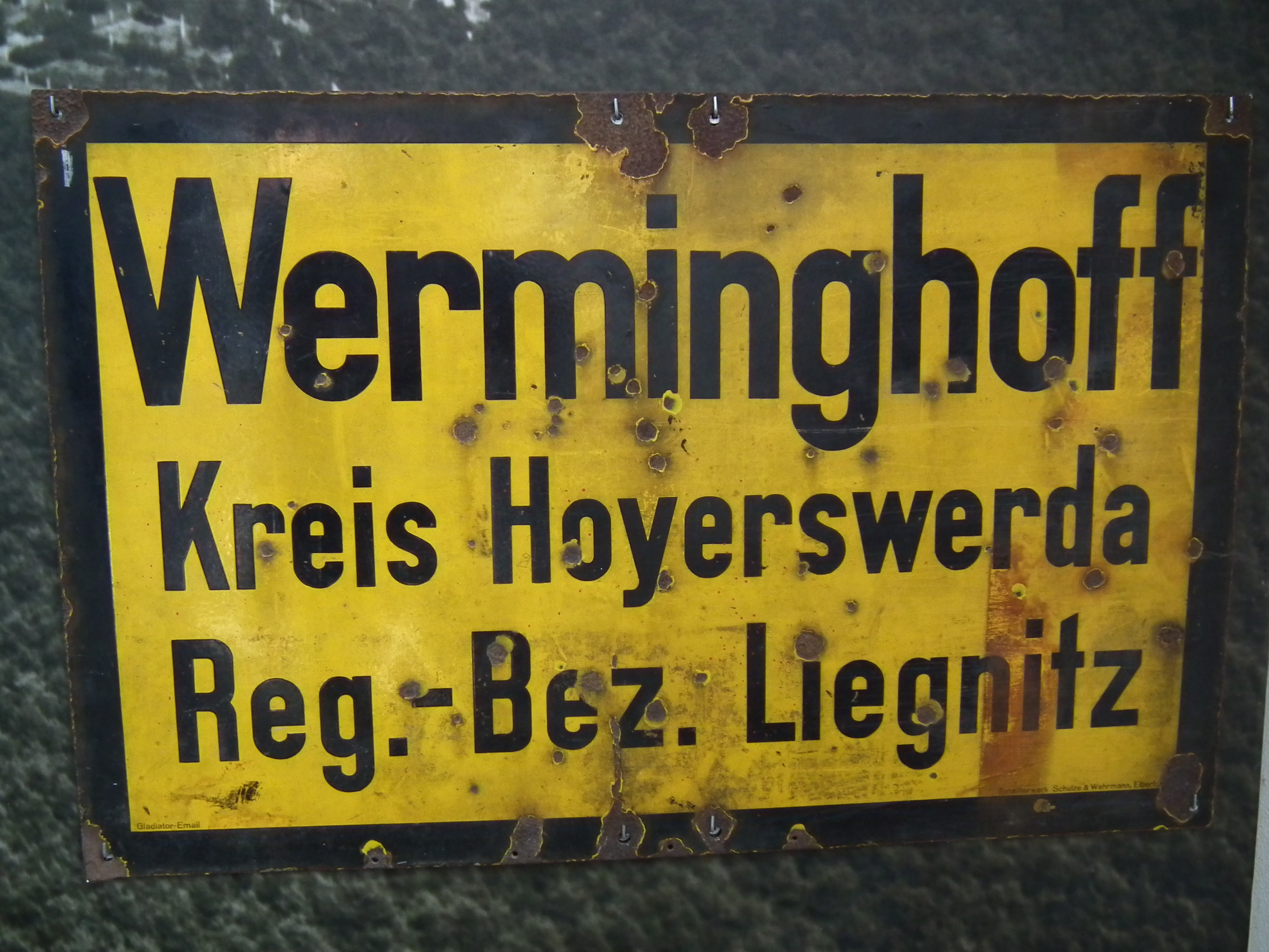 Energiefabrik Knappenrode 2016-05-05; Ortseingangsschild Werminghoff